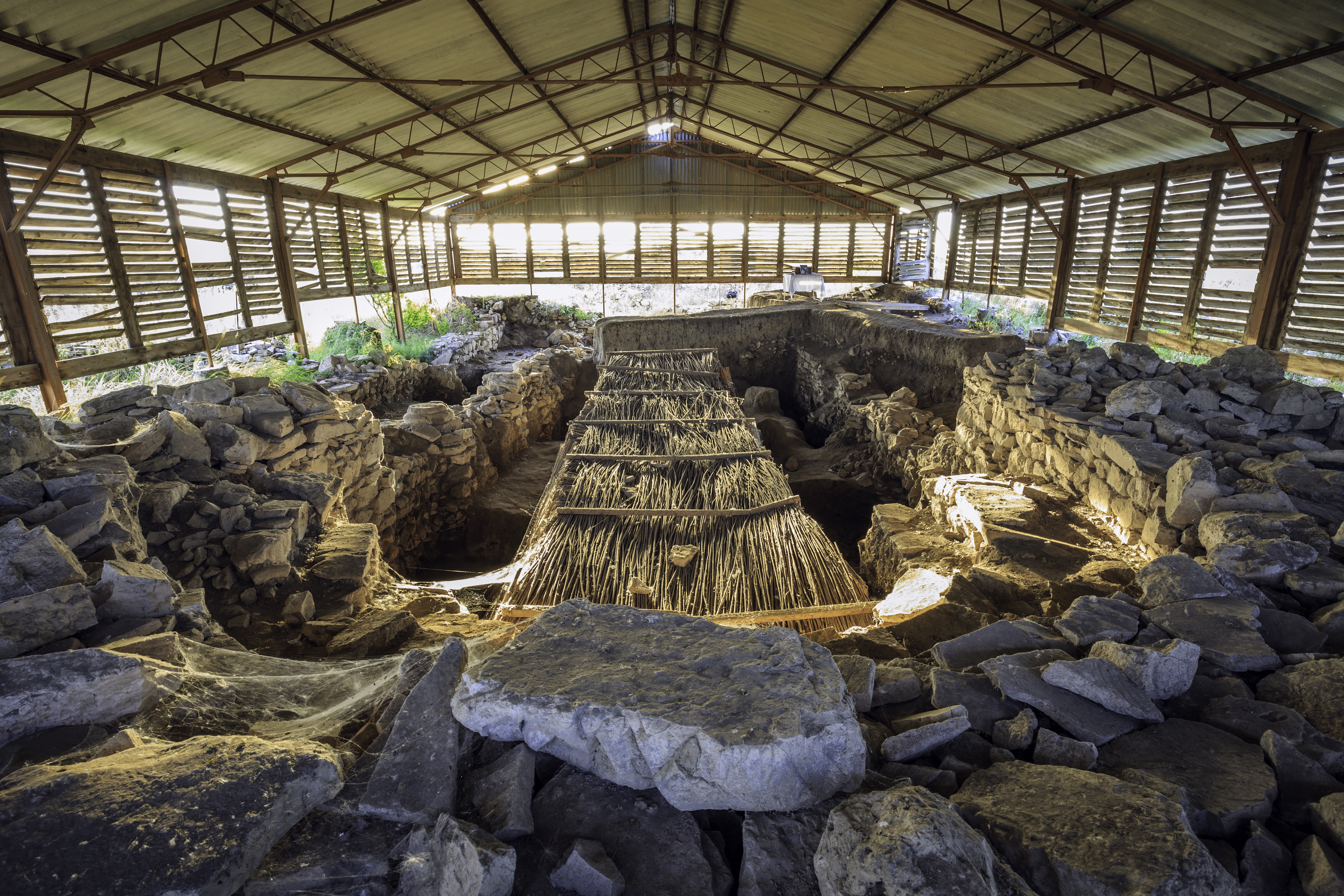 Cetatea Halmyris, vedere interioara.